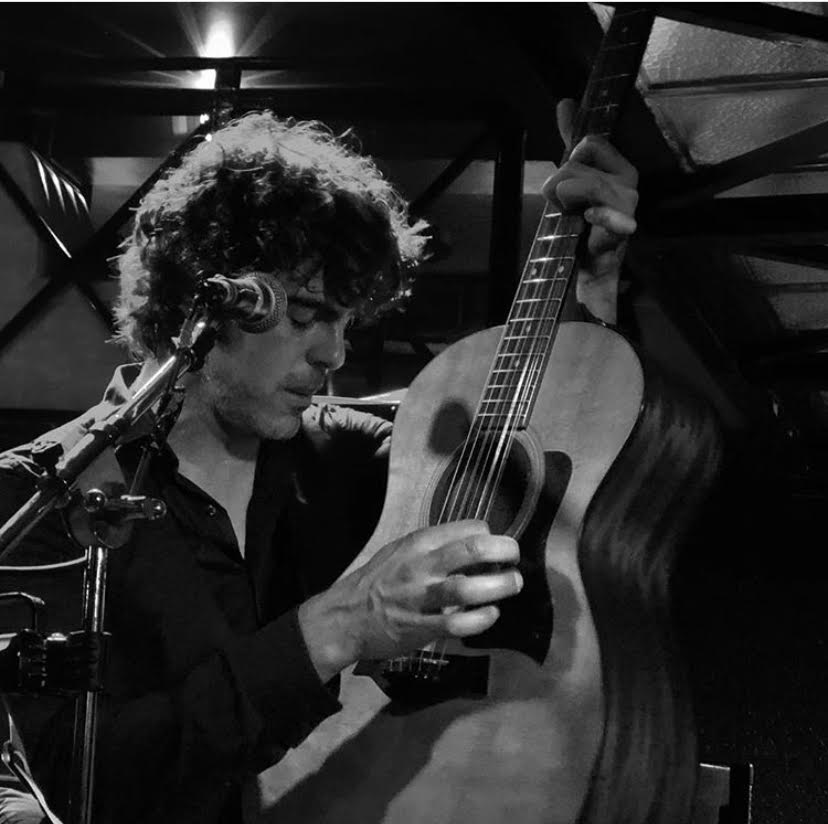 Bosco Hill, La Iguana Club, Vigo